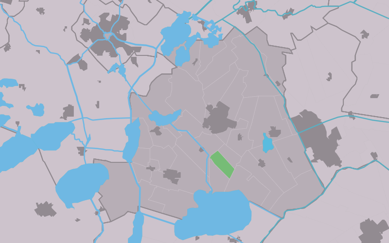 Kaartsje fan himrik fan Ousternijegea